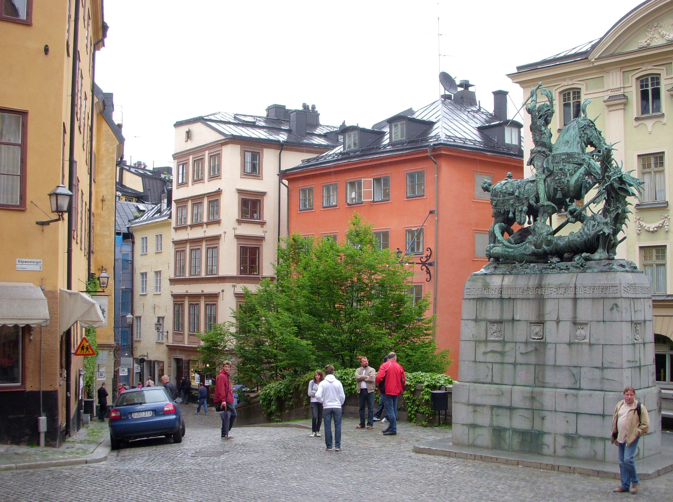 Köpmanbrinken (norra) i Gamla stan, vy från Köpmantorget mot norr